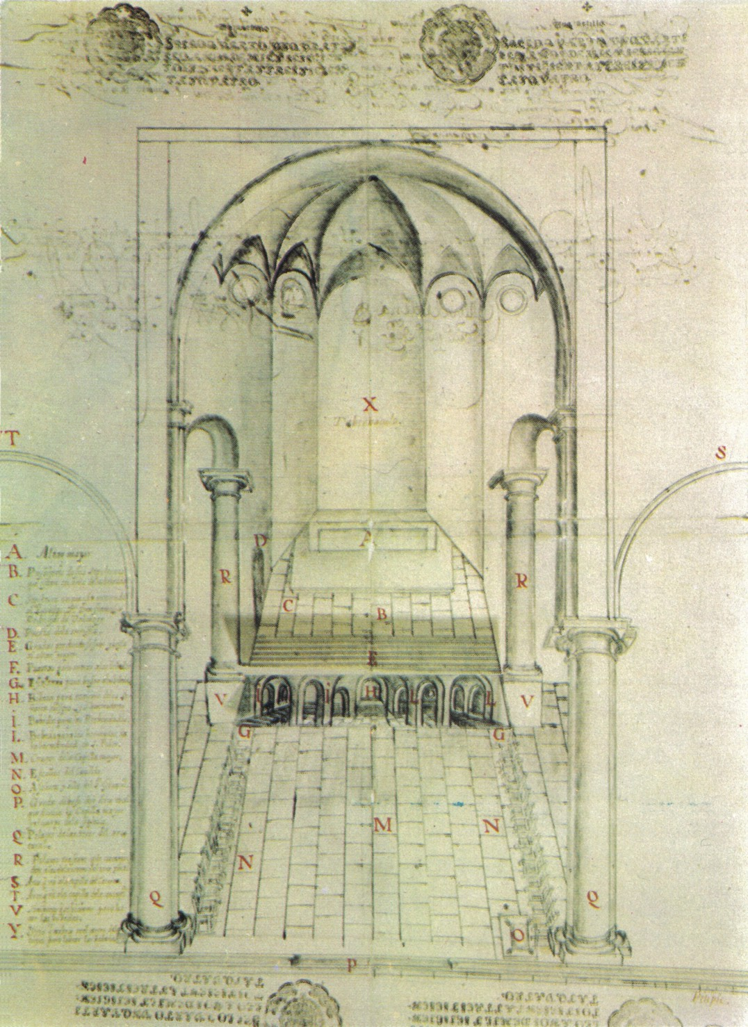 Plano de la capilla mayor de la Catedral de Cartagena de Indias, enviado por la Hermandad de Sacerdotes de San Pedro al Consejo de Indias, en 1666. Se puede ver la bóveda esquifada que cubre la capilla mayor, también se puede ver la especie de cripta bajo el presbiterio, destinada a servir de tumba a los sacerdotes de la ciudad, se